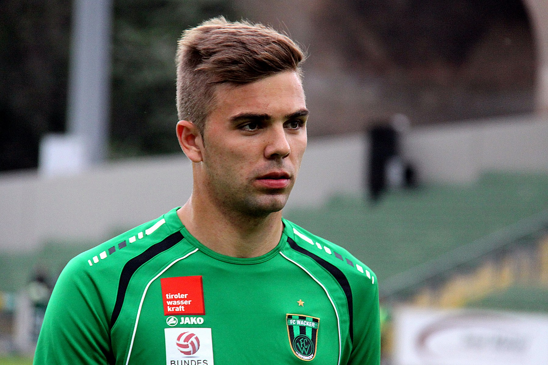 Meisterschaftsspiel der österreichischen Bundesliga: SV Mattersburg gegen FC Wacker Innsbruck am 7. April 2013 (0:0)] im Mattersburger Pappelstadion.] - Das Foto zeigt Lukas Hintersser (FC Wacker Innsbruck). Object location47° 44′ 21.66″ N, 16° 24′ 23.13″ E